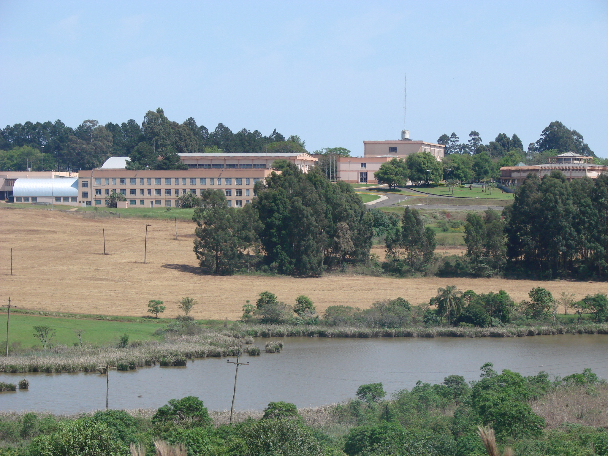 Vista da UNICRUZ a partir da estrada em frente ao Hospital Veterinário